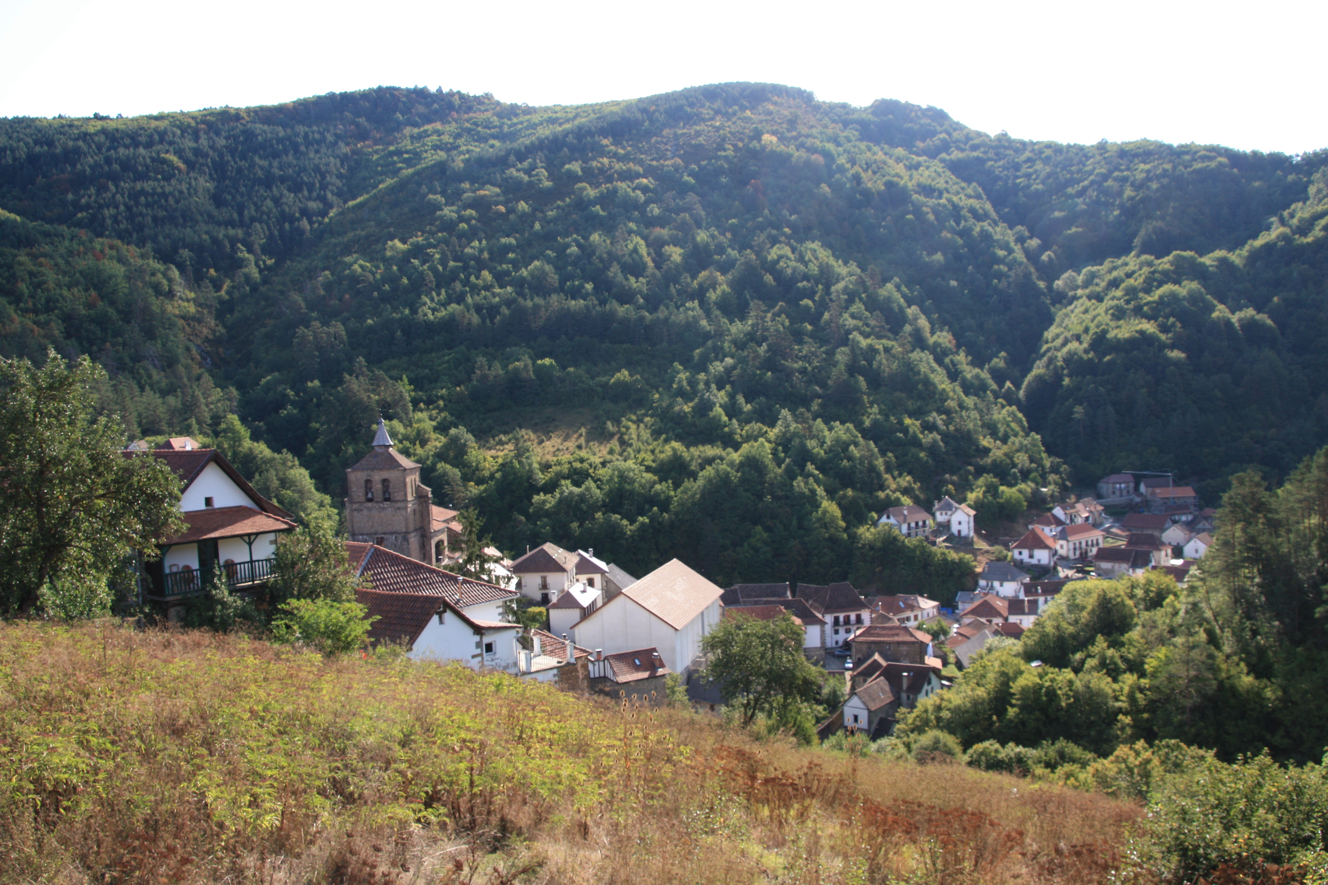 Uztarrozen ikuspegia.